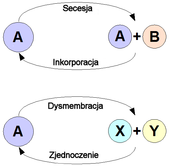 Powstawanie i rozpad państw (Secesja, Dysmembracja, Inkorporacja, Zjednoczenie)